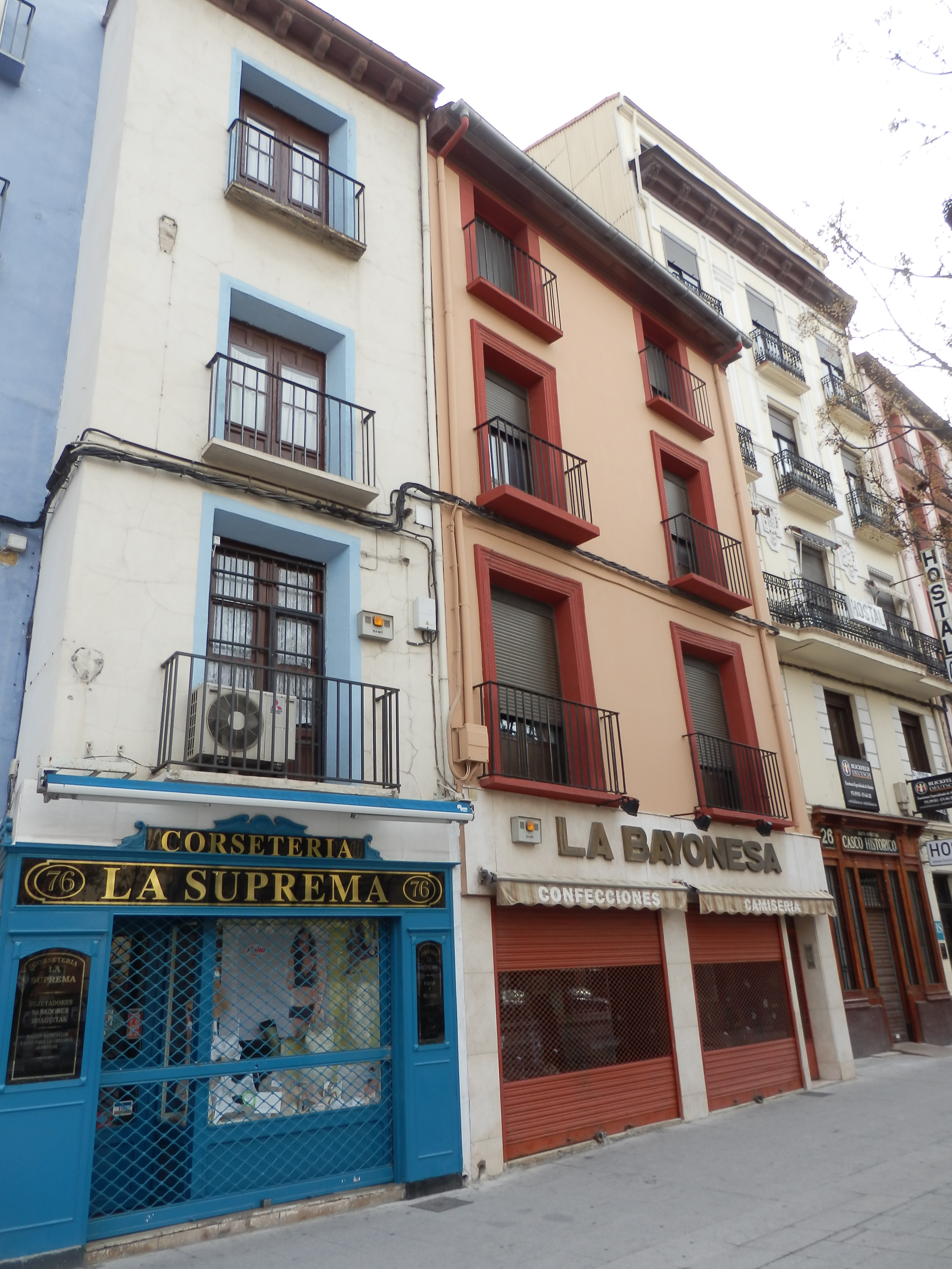 Edificio en la avenida César Augusto, 76, de Zaragoza. Antigua calle Cerdán, 30. En este edificio tuvo una consulta la doctora Amparo Poch.